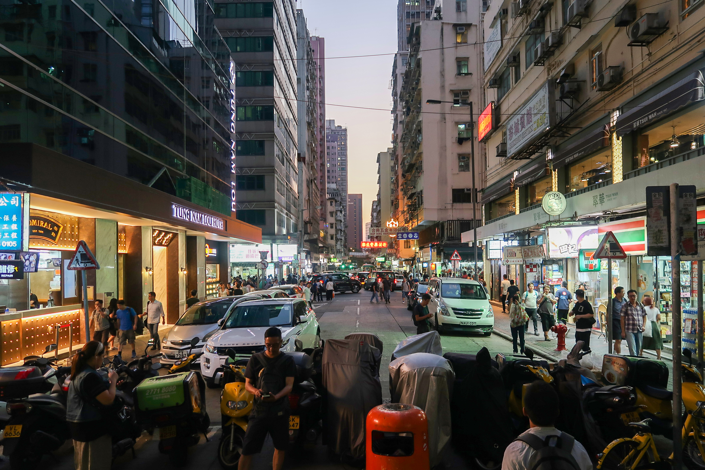 Pitt Street